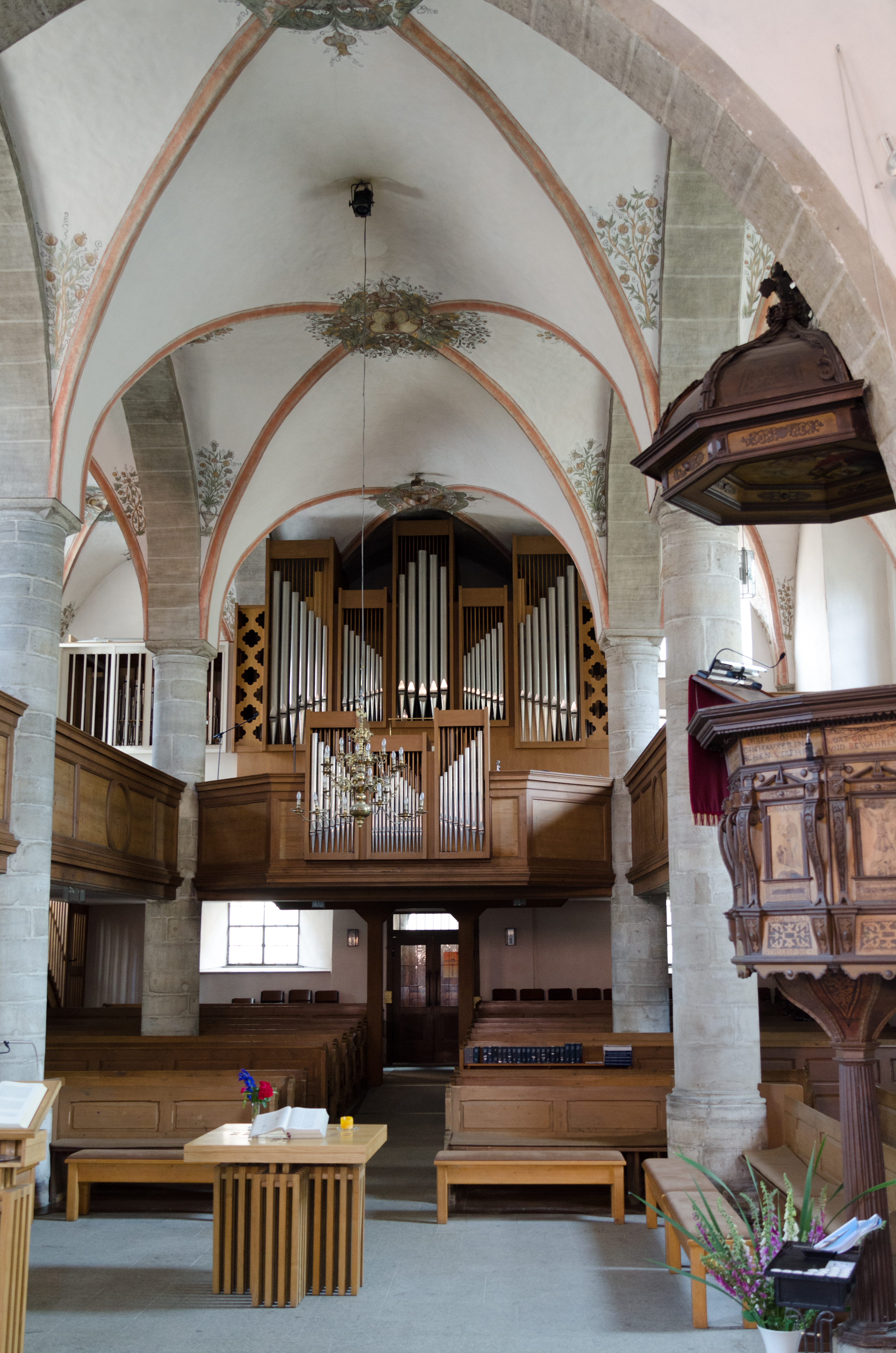 Marktredwitz, Evangelisch-lutherische Pfarrkirche St. Bartholomäus